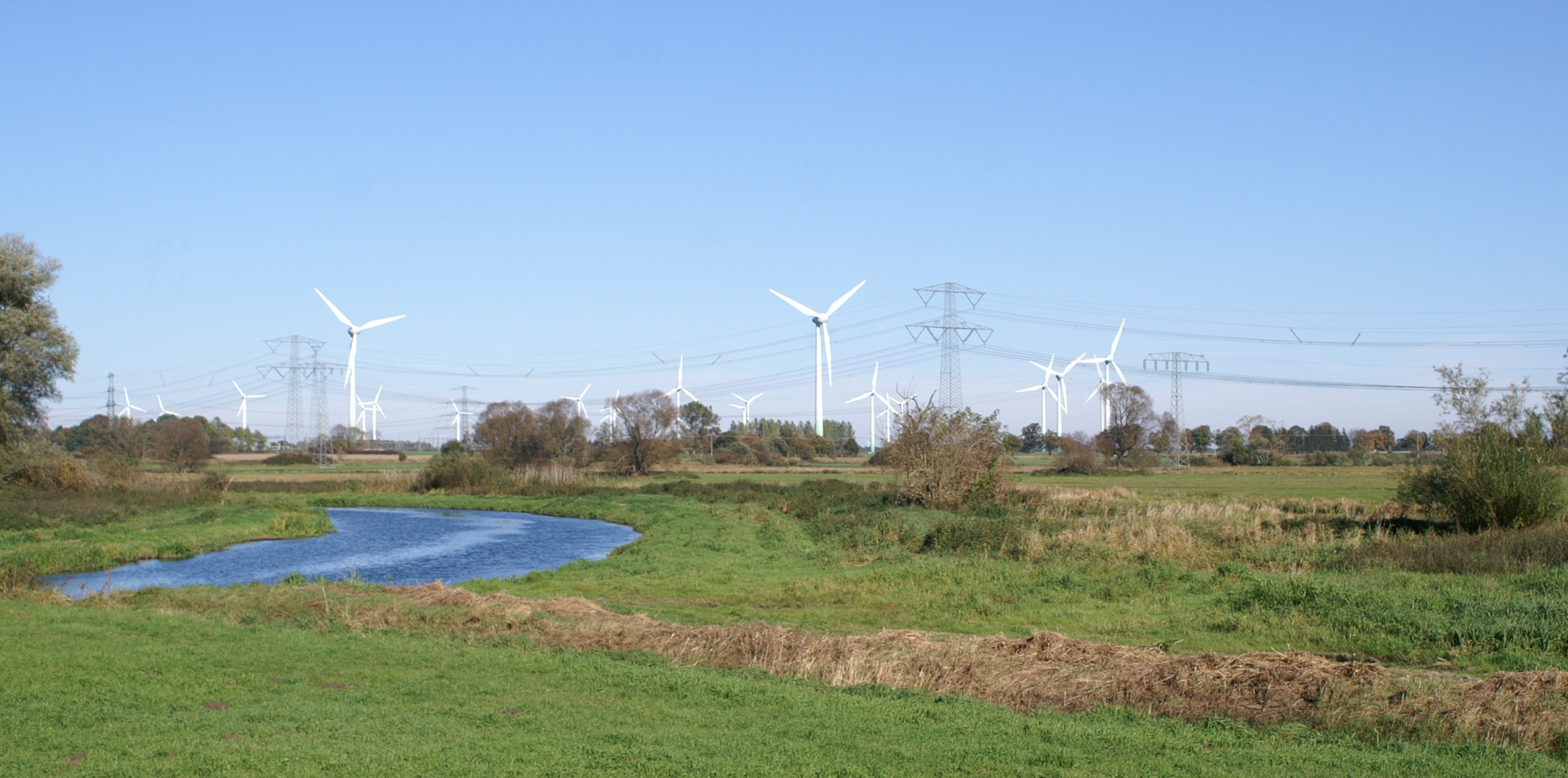 Blick über die Tollense bei Sanzkow zum Windpark Siedenbrünzow